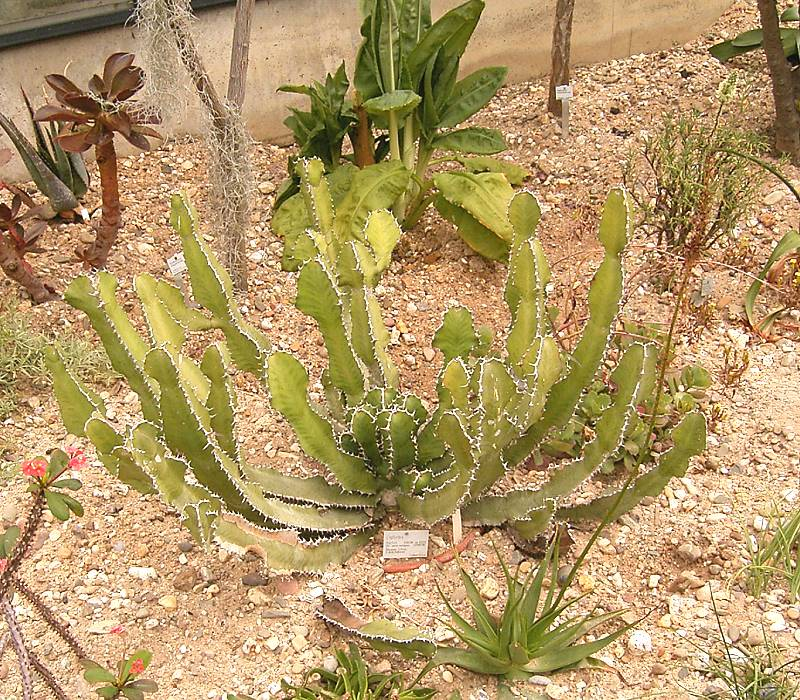 Euphorbia cactus var. cactus, BG Bochum, Germany